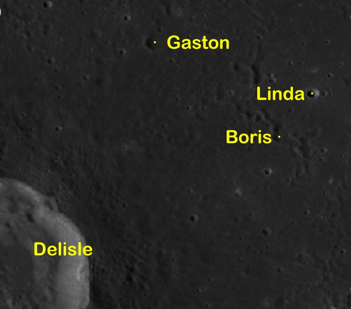 Cráter lunar Boris. Localización. (Imagen de la misión LRO)